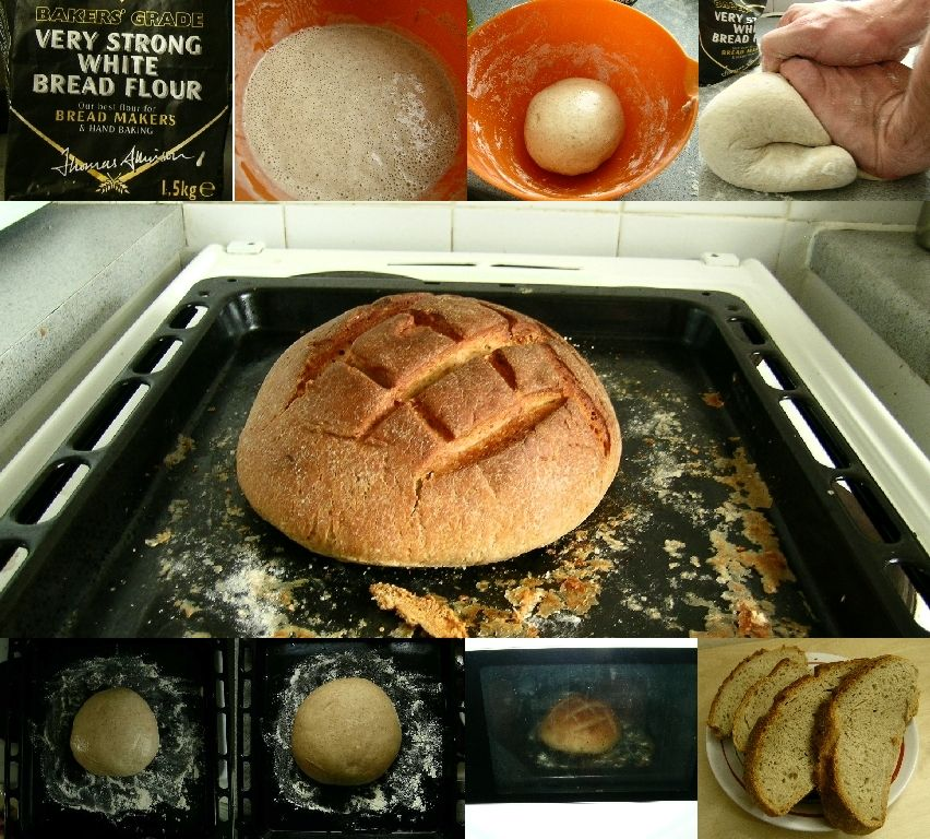 Imagén realizada por Ibán Yarza. Del dominio público. Se agradece, no obstante, que se atribuya la autoría. Que se cite, vamos.